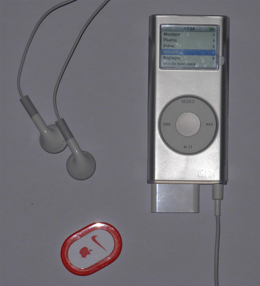 iPod Nano 2G avec kit Nike+